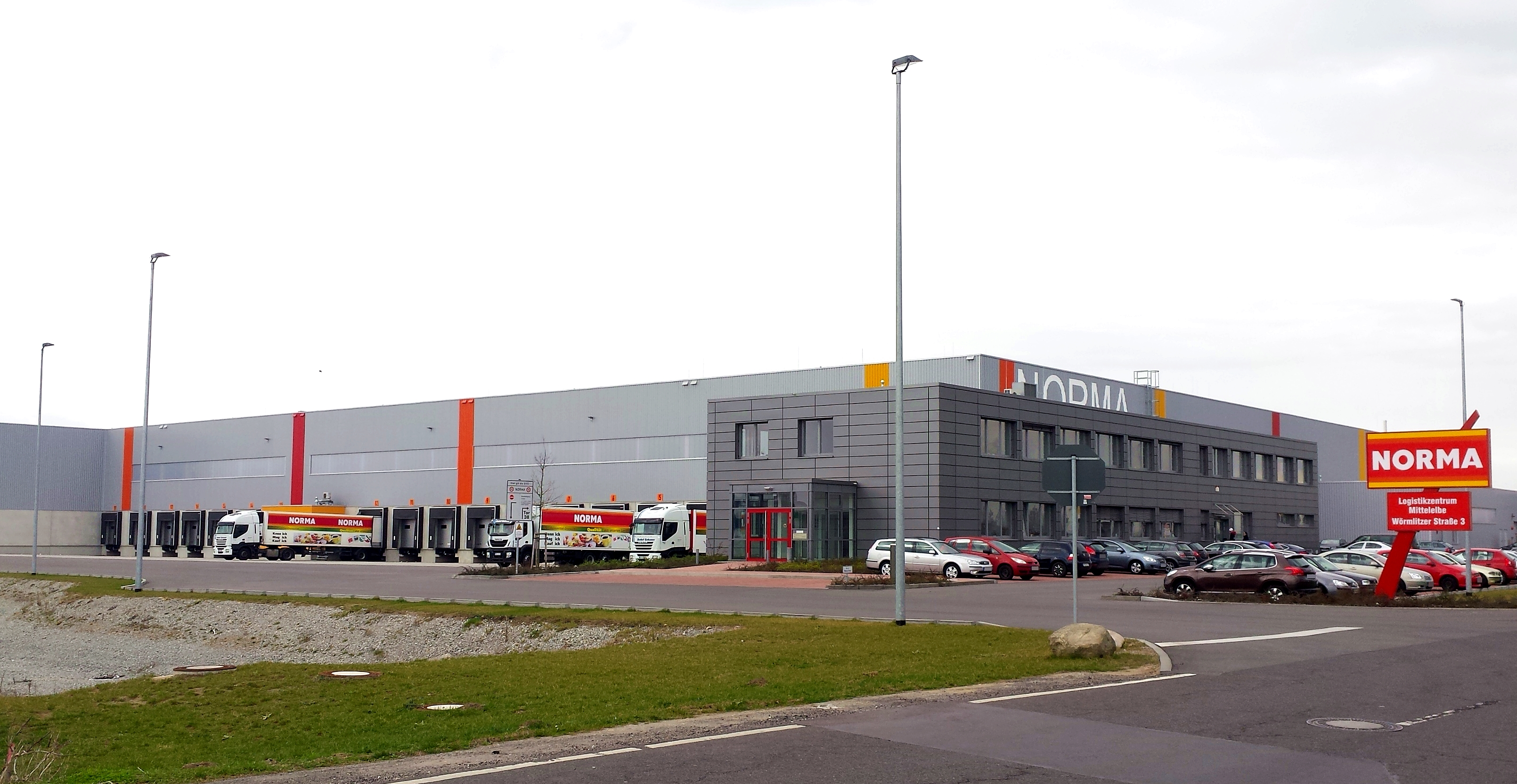 Norma Logistikzentrum im Industrie- und Logistikcentrum Magdeburg Rothensee